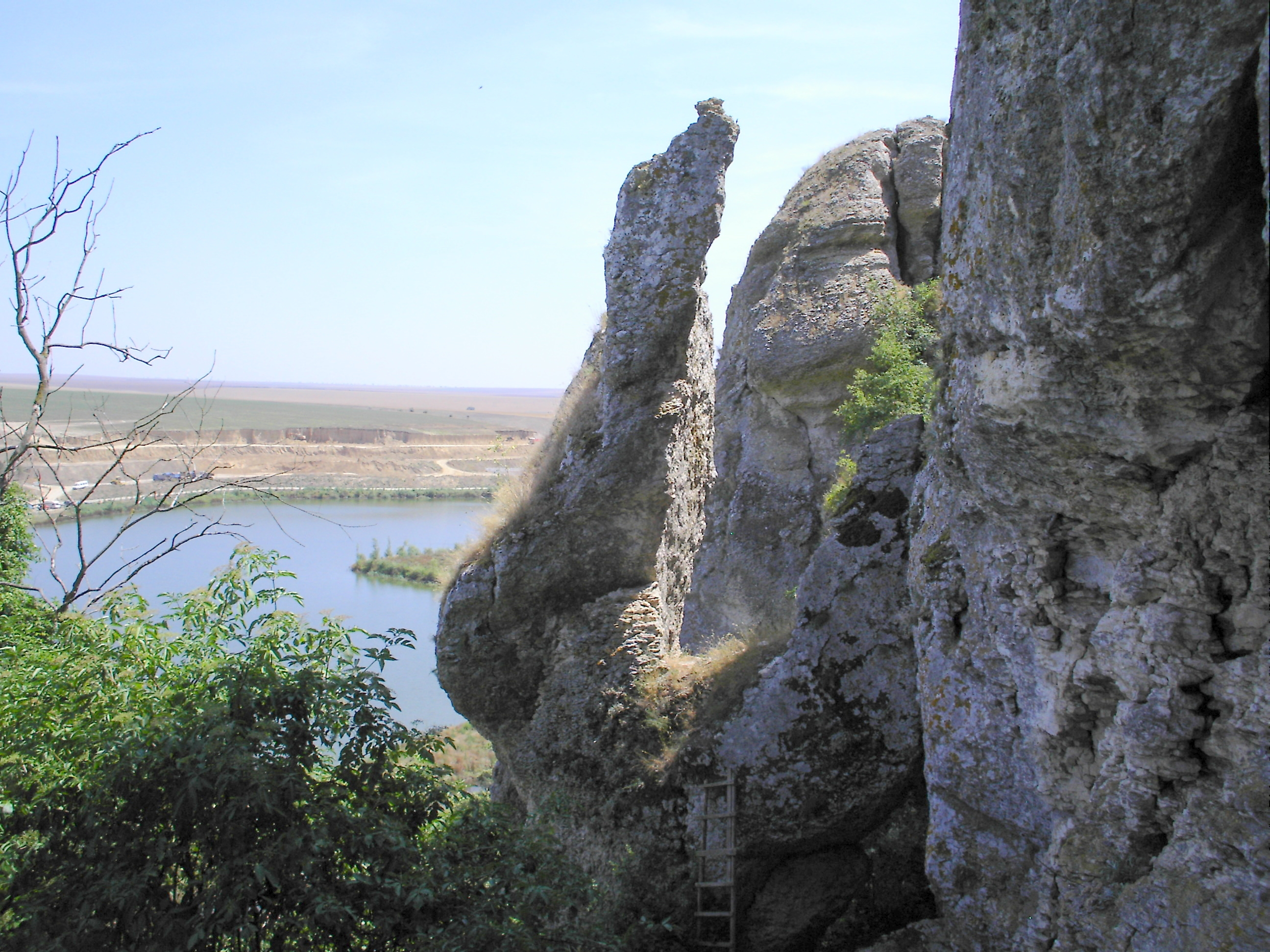 Locuirea din "Peștera Casian"